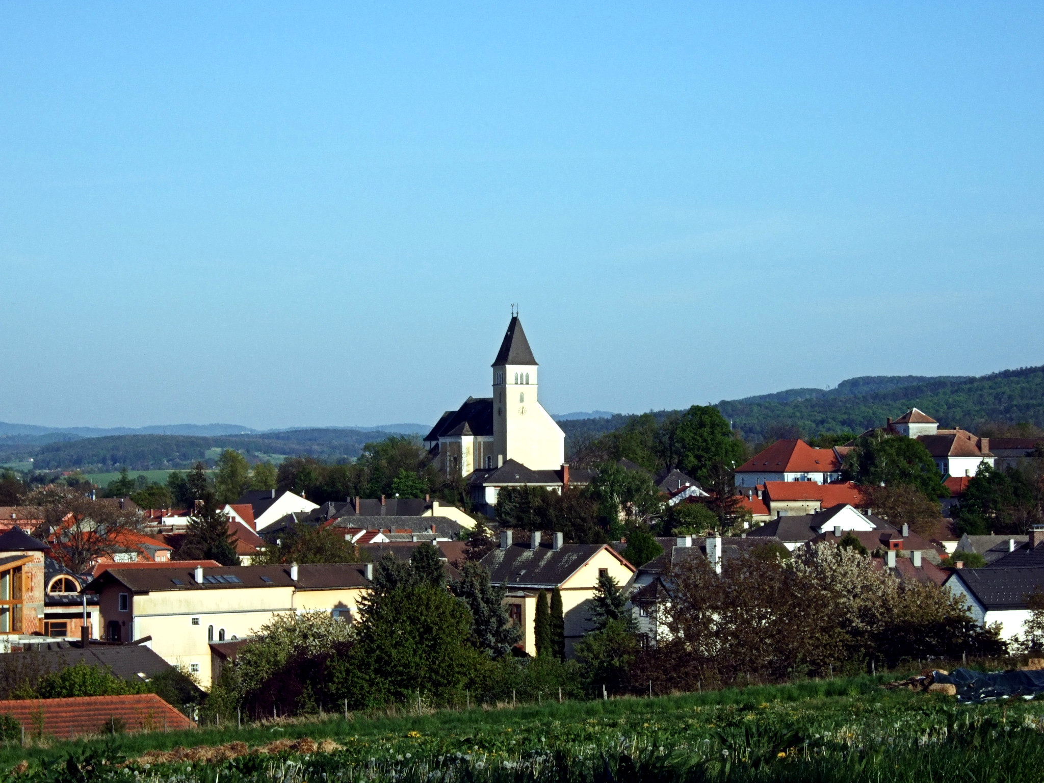 Marktgemeinde Böheimkirchen in Niederösterreich